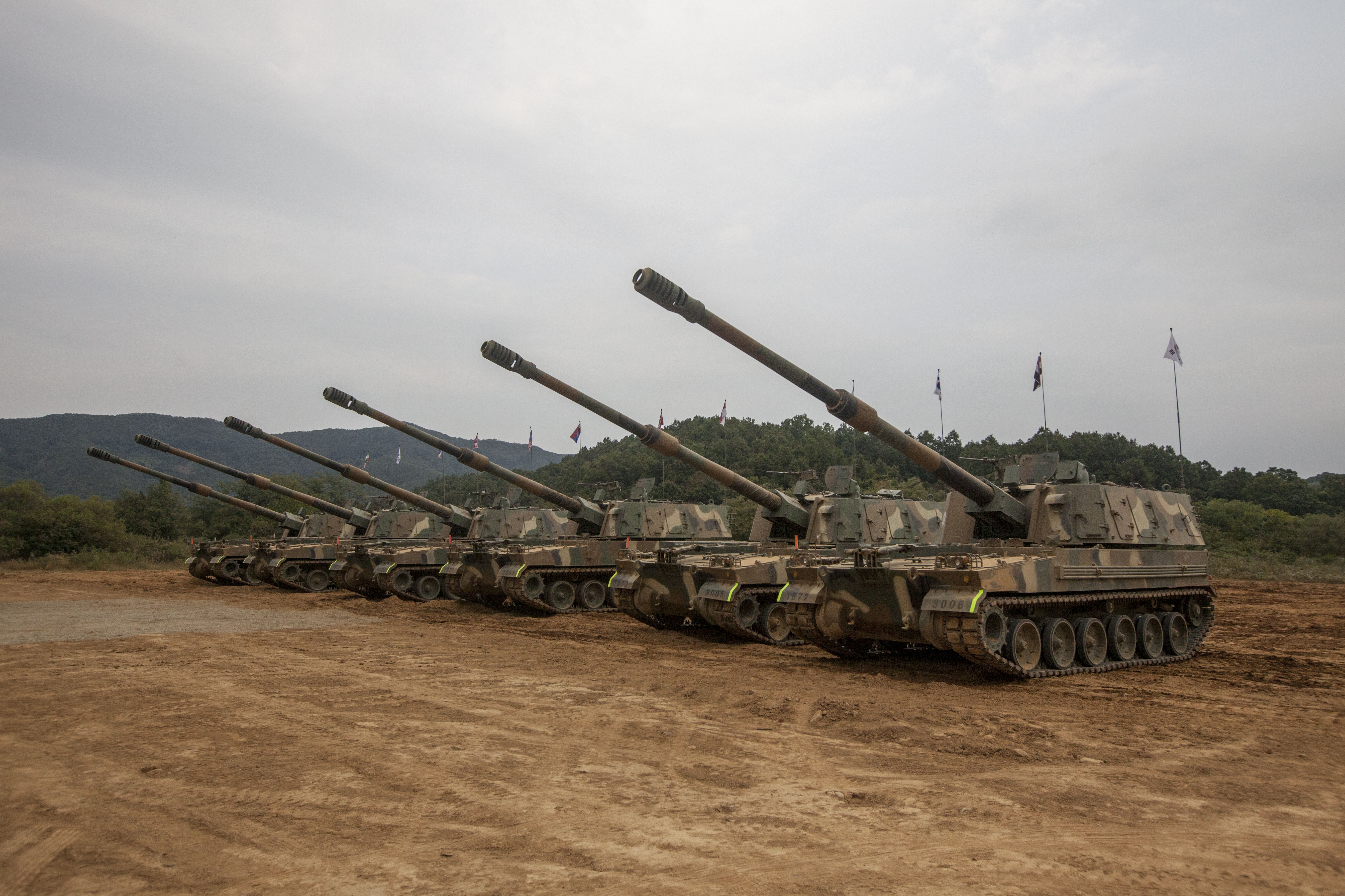 사진 - 정승익 육군 블로그 사진작가